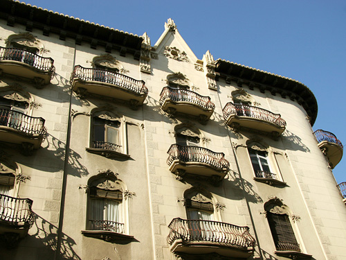 Casa Sagnier, Valencia, Spain.